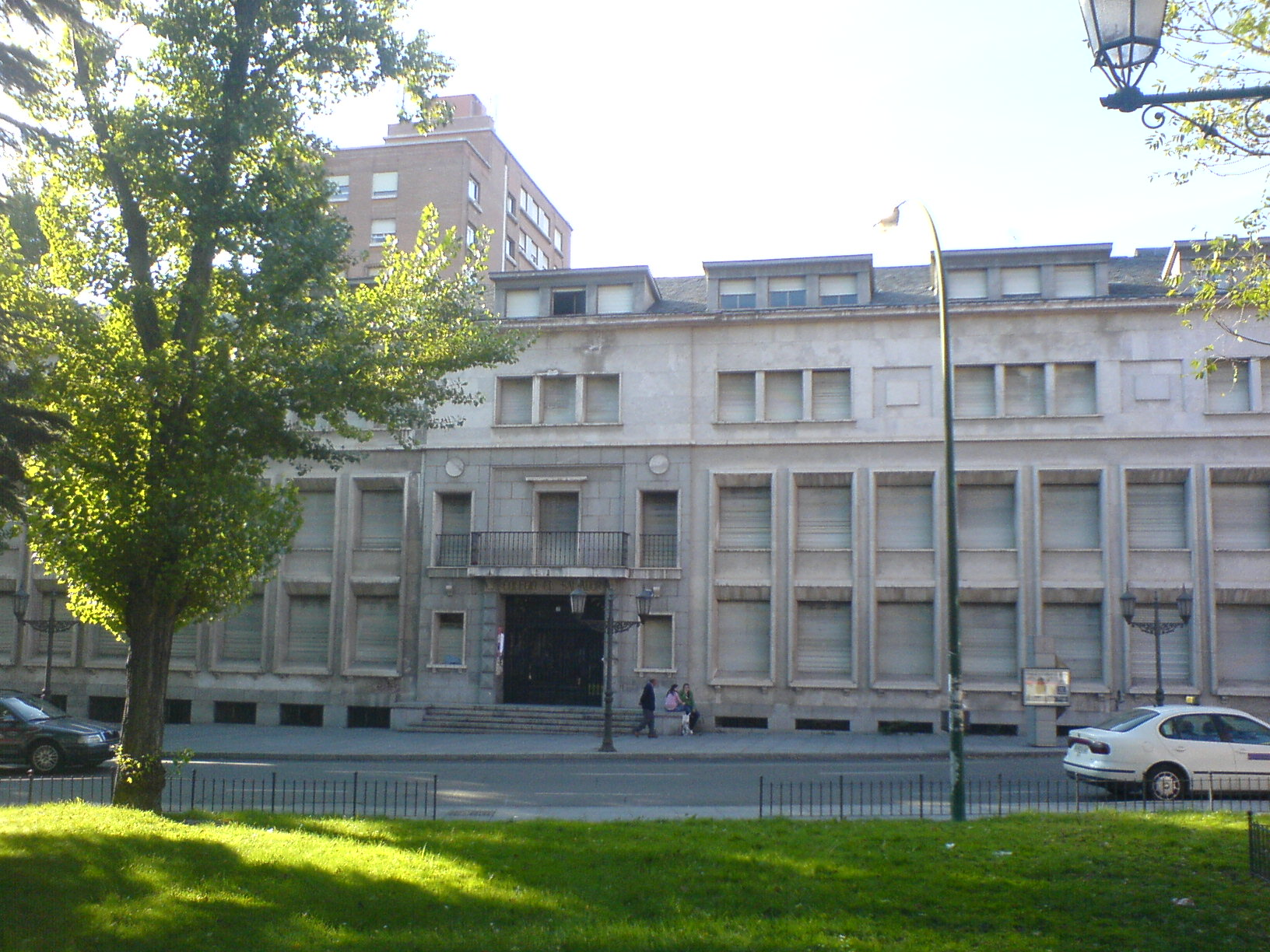 Antiguo Colegio El Salvador, Valladolid